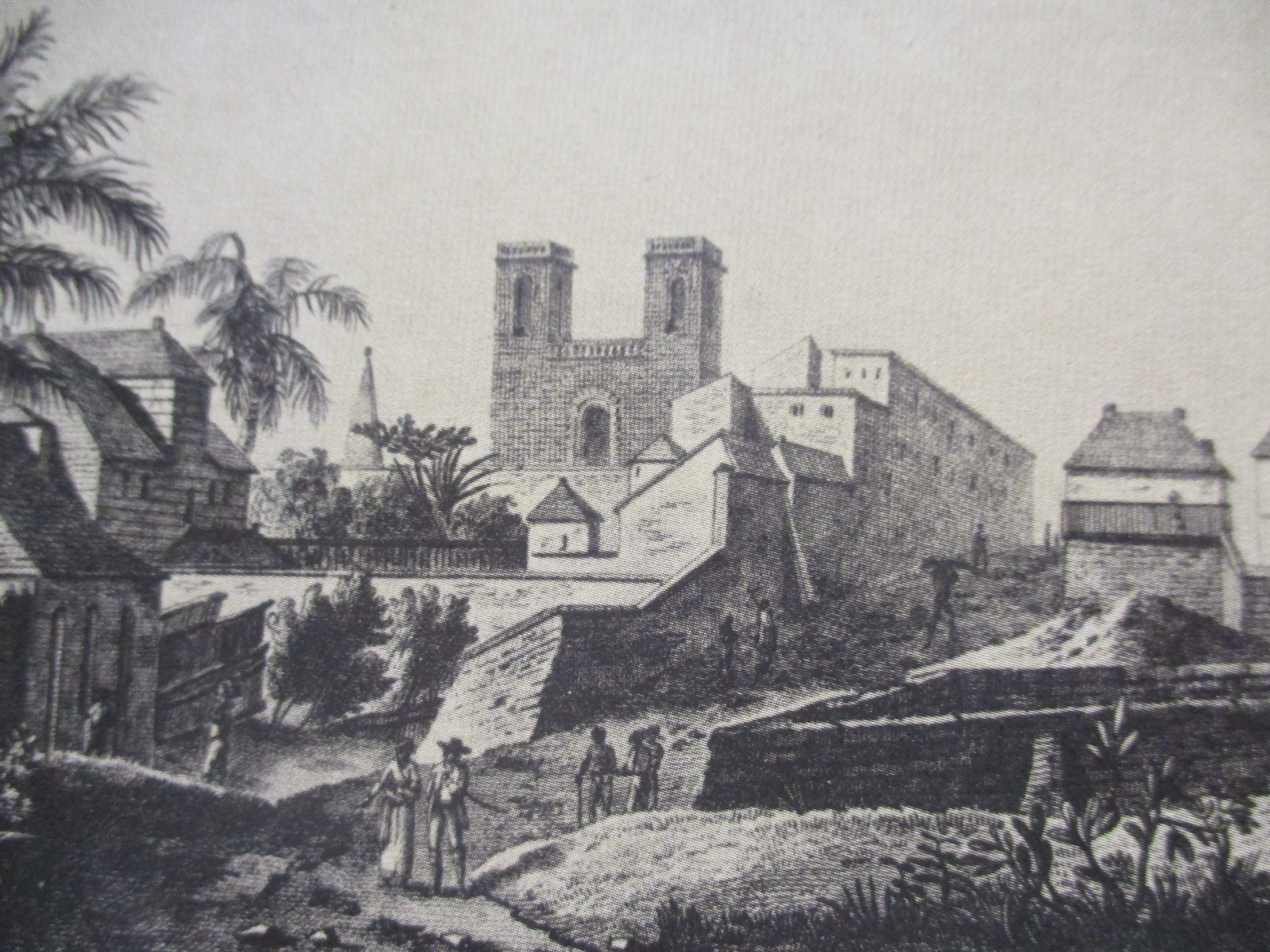 Cathédrale de Port-Louis en 1812 (gravure)